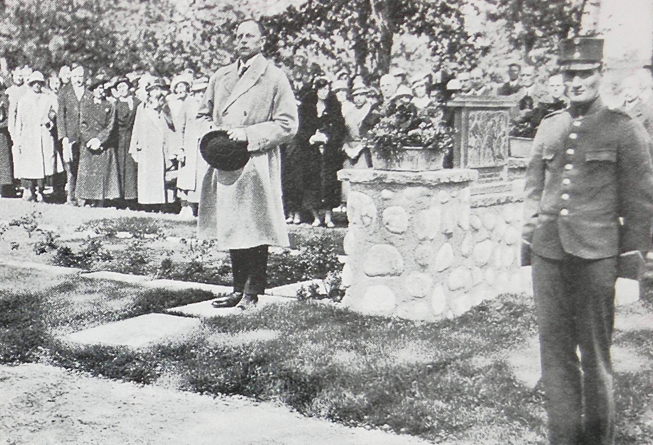 Svenska Gymnastikläraresällskapets ordförande, kapten G. Liljegren, avtäcker minnesmärket å P. H. Lings gamla gård vid Annelund. Foto: Stockholms-Tidningen.